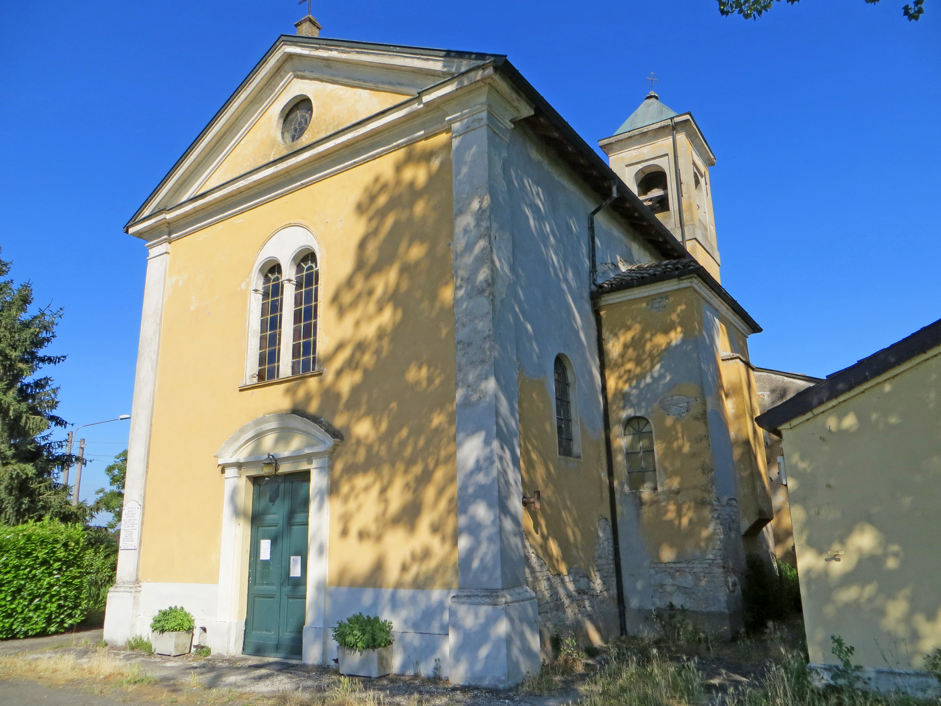 Chiesa di Sant'Andrea Apostolo in Antognano (Parma) - facciata e lato sud